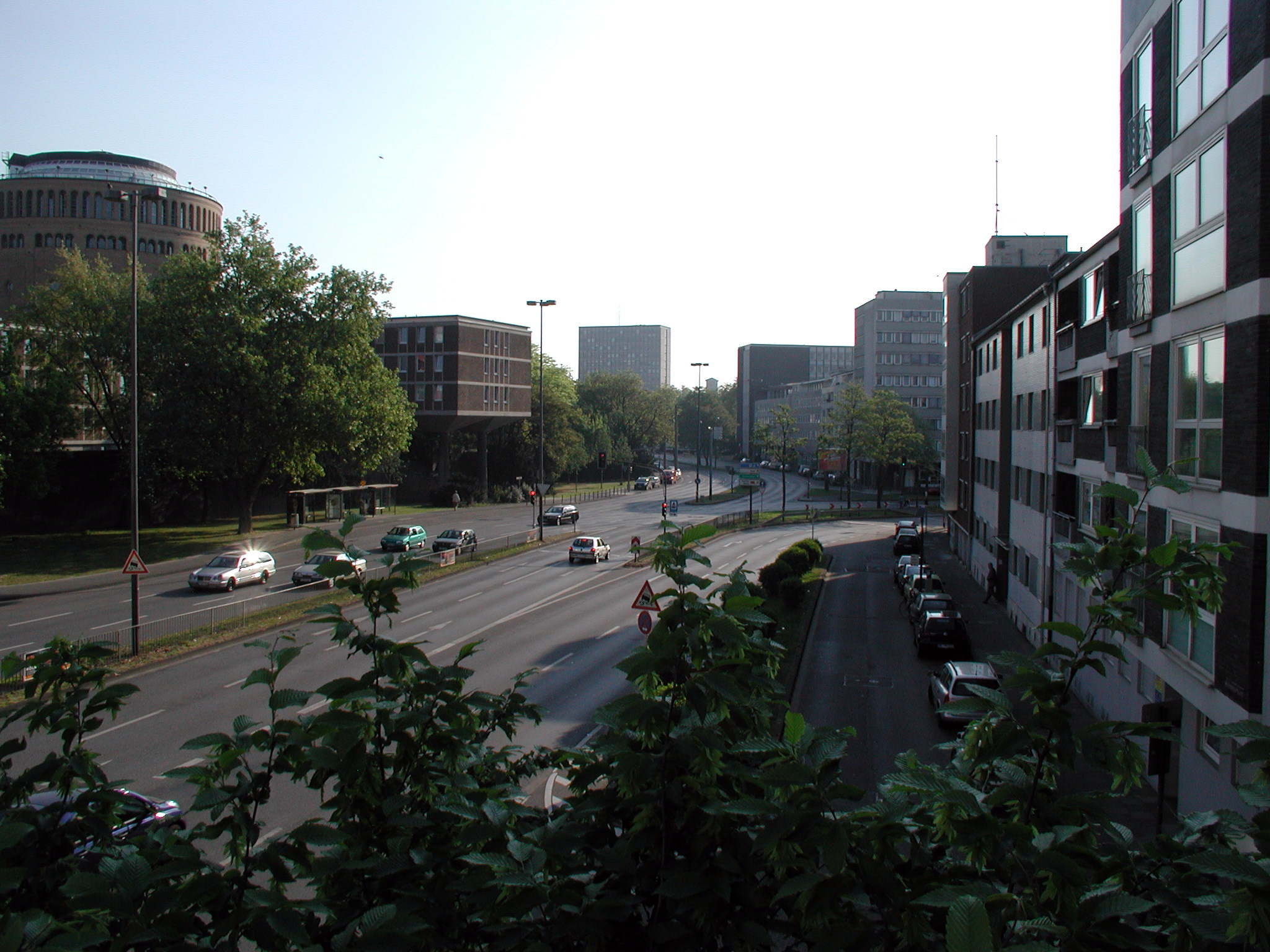 Kölner Bäche